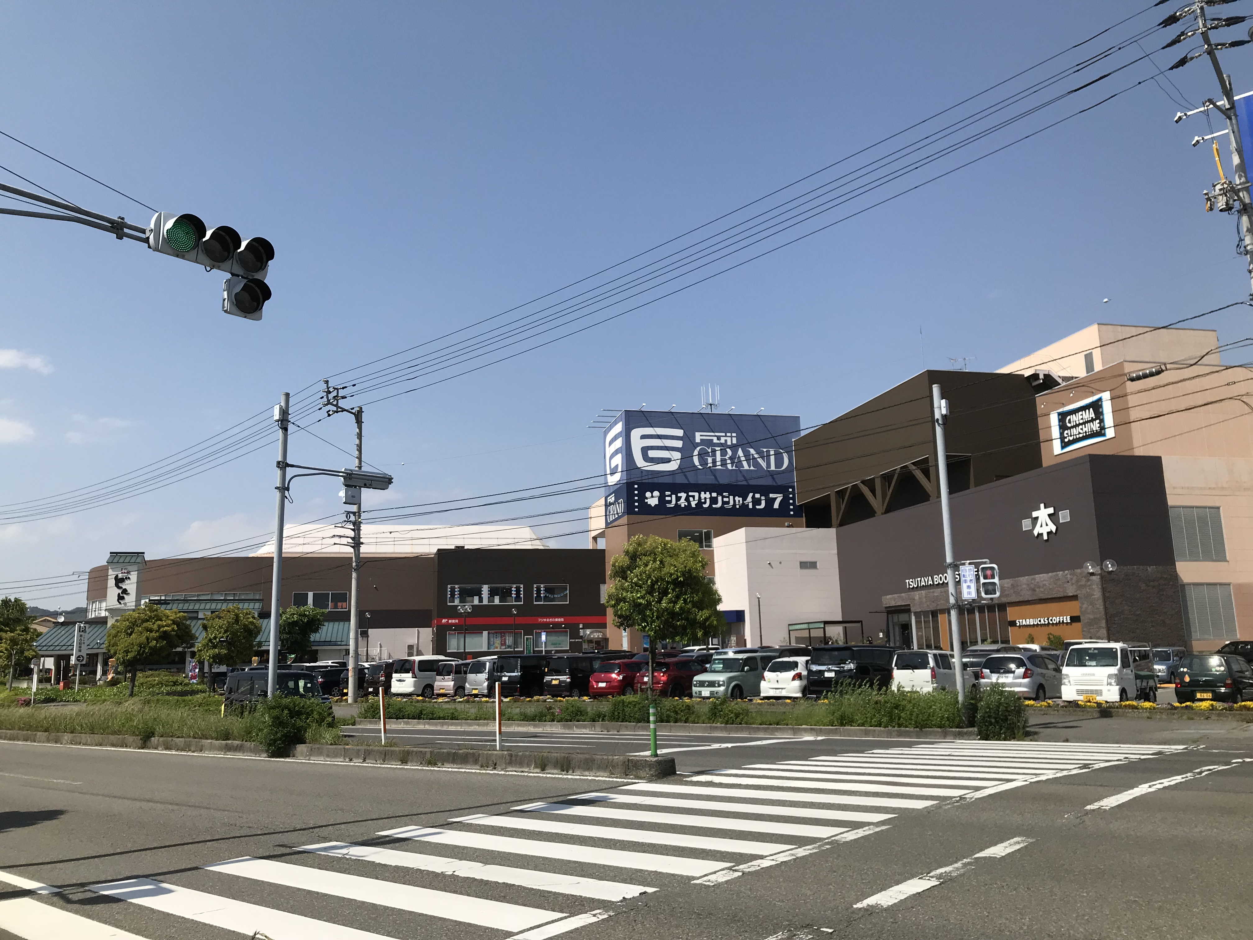 2018年5月のフジグラン重信 西館です。